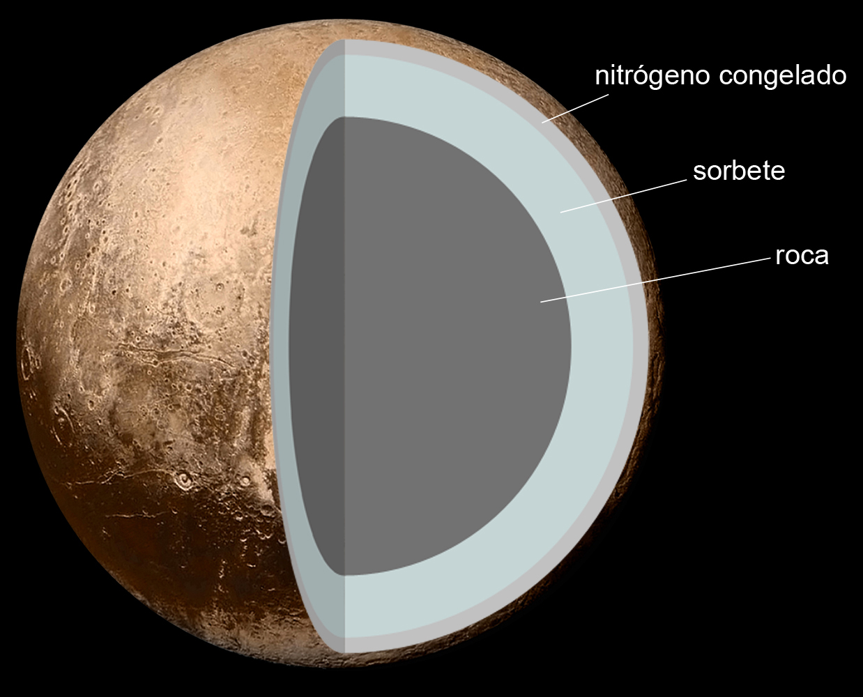 Estructura teórica de Plutón nitrógeno congelado sorbete roca